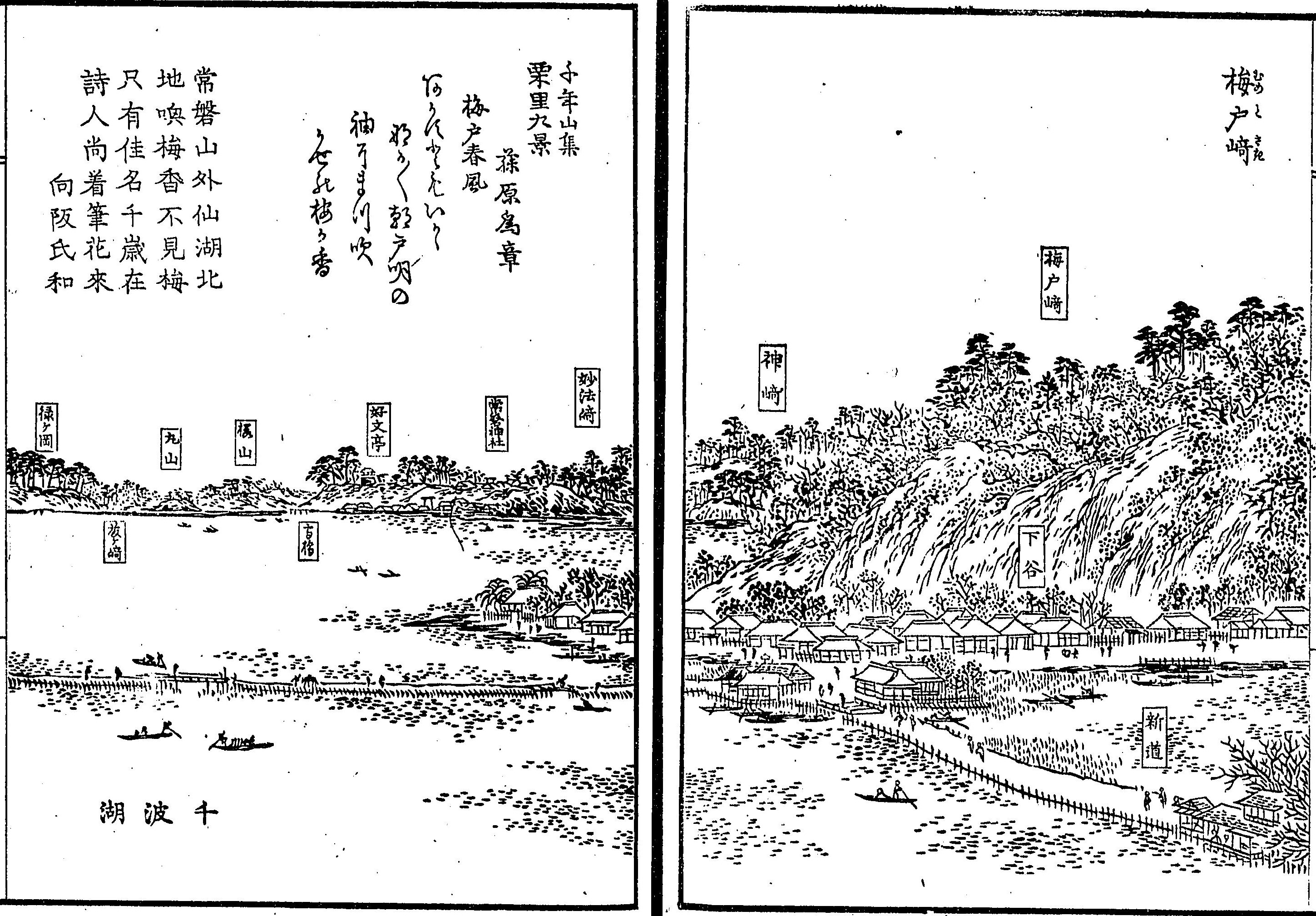 千波湖の図/梅戸崎(『茨城常盤公園攬勝図誌』松平俊雄 著 YDM23693 (マイクロフィッシュ) )コマ番号86 改編 国立国会図書館デジタルコレクション:インターネット公開（保護期間満了）